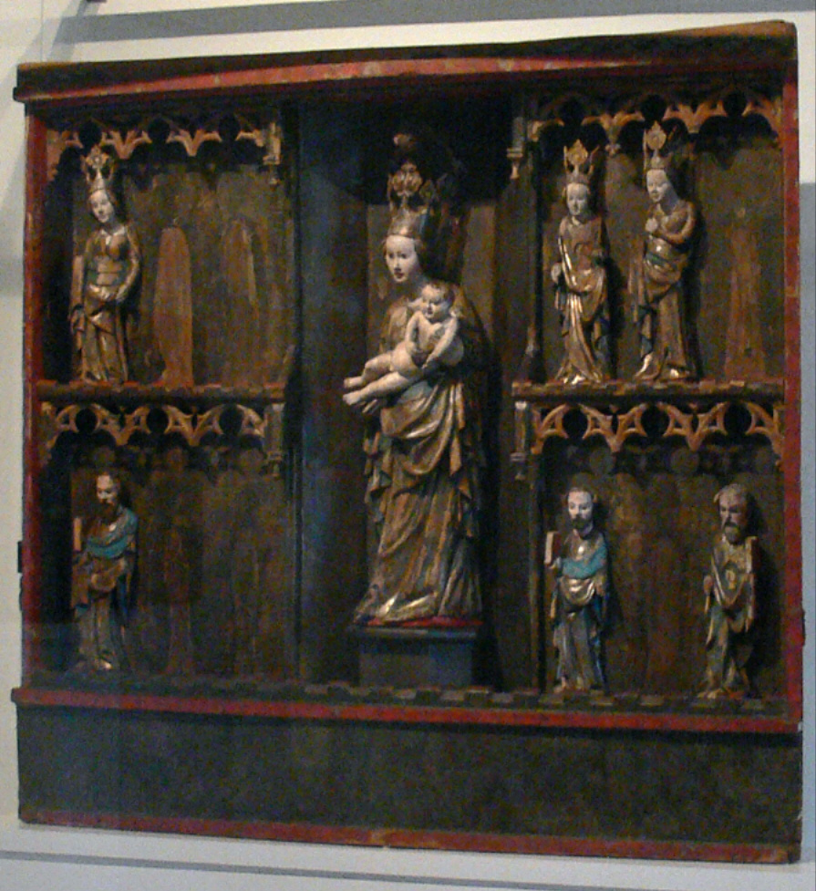 Altar aus Topfseifersdorf (Gde. Königshain-Wiederau) bei Rochlitz, um 1400 Staatliche Kunstammlungen Dresden, Skulpturensammlung, SAV 2007 (ausgestellt im Schloßbergmuseum Chemnitz)